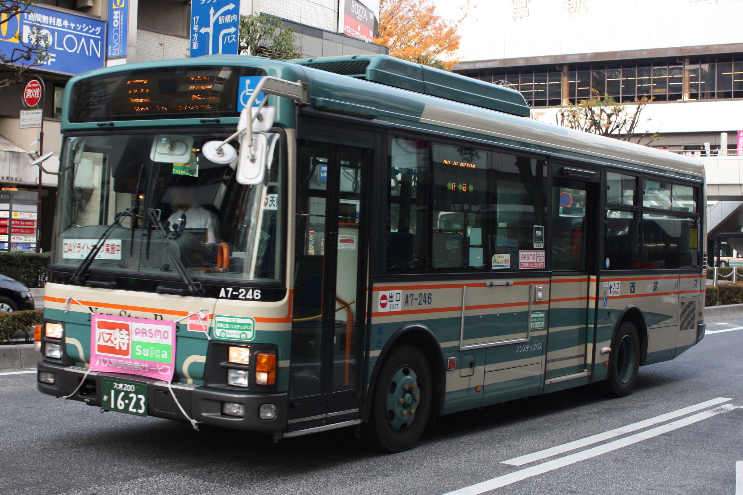 西武バス大宮営業所 車番:A7-246 PDG-LR234L2 大宮駅西口にて